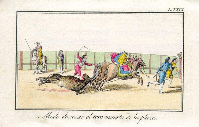 Delgado y Gálvez, José: Tauromaquia o arte de torear á caballo y á pie